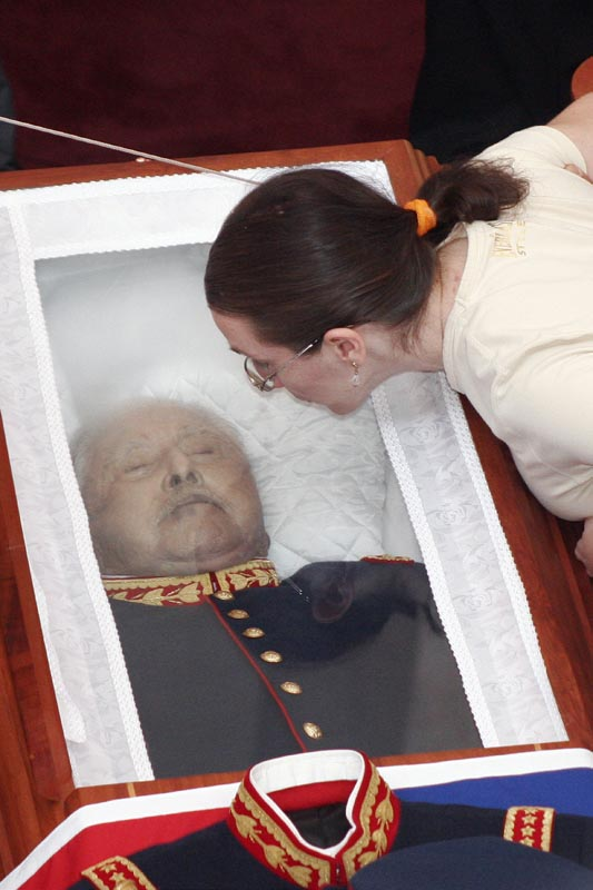 féretro de Augusto Pinochet en el salón central de la Escuela Militar